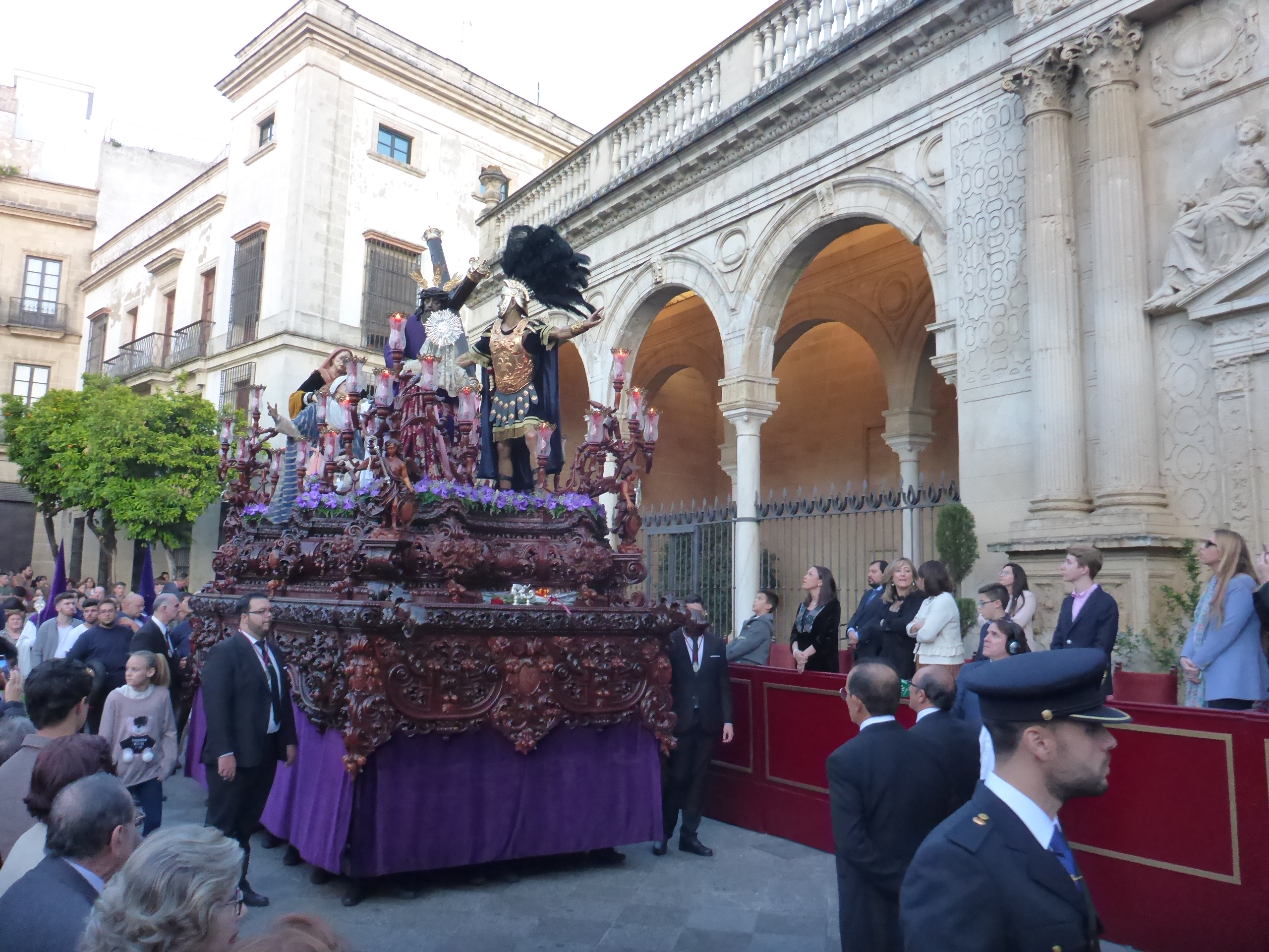 Hermandad de la Candelaria (Jerez)